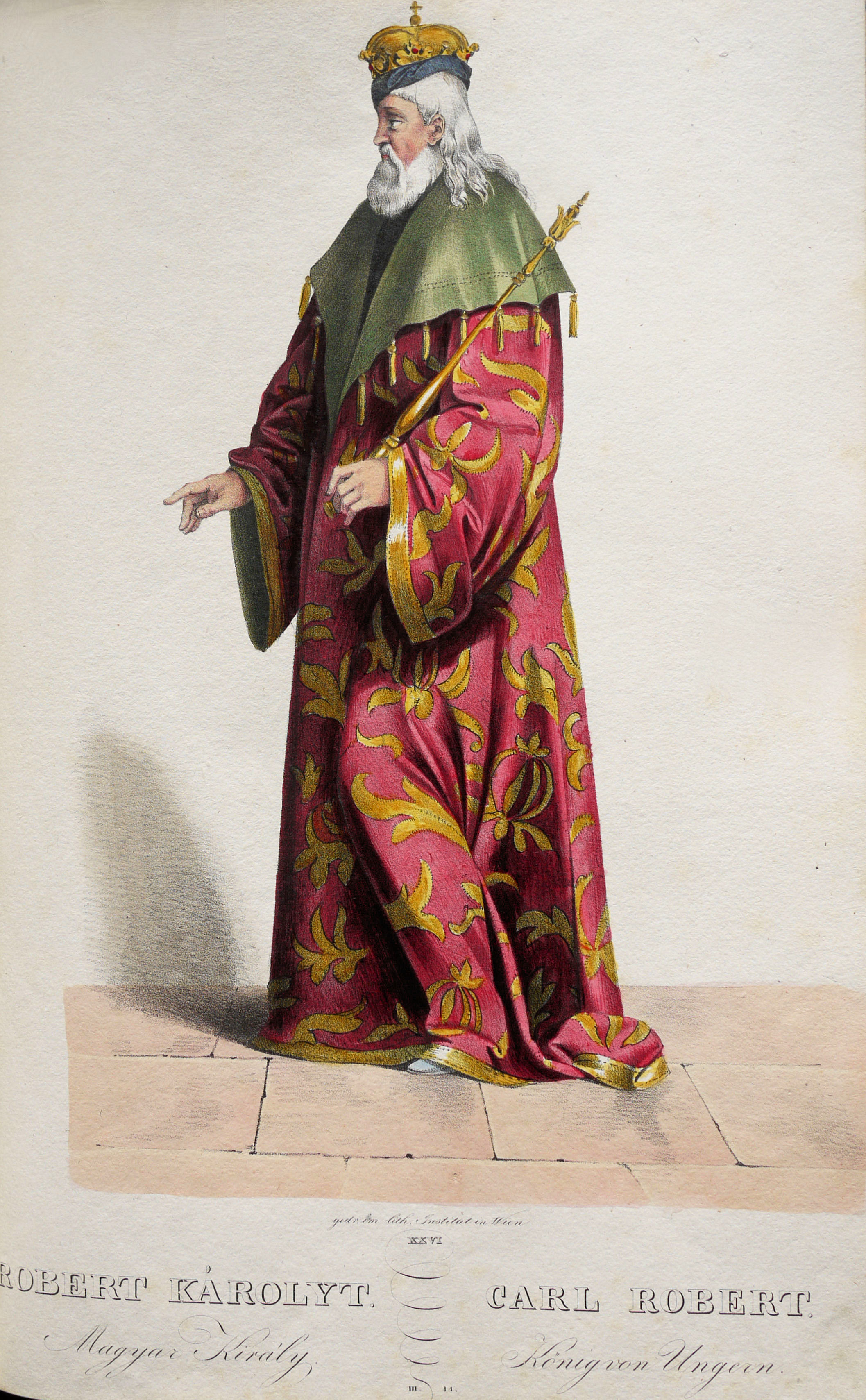 Karl I. (1288-1342), König von Ungarn. Lithographie von Josef Kriehuber nach einer Zeichnung von Moritz von Schwind aus Ungerns Erste Heerführer Herzoge und Koenige In einer Reihe von Bildnissen von Bela bis auf Seine Majestät Franz I. Kaiser Von Österreich König Von Ungern &c., &c. Wien : Lithographisches Institut ;ca. 1828